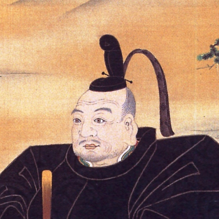 徳川家康の顔。